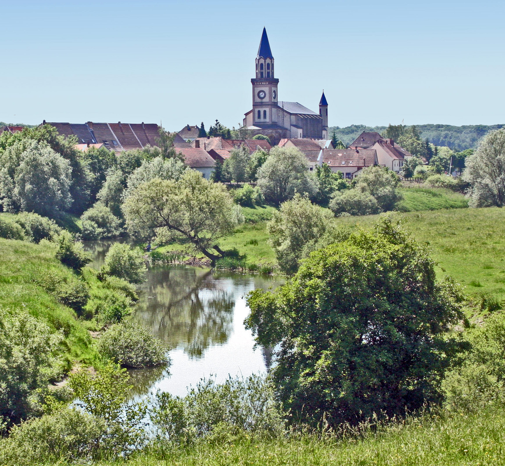 Herbitzheim